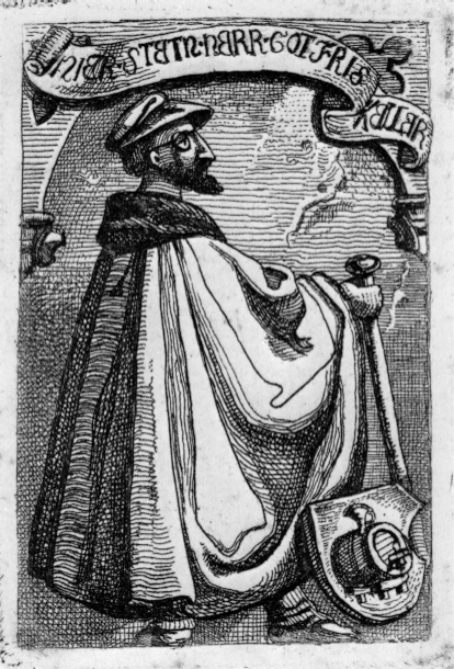 Gottfried Keller, etching 5,2 x 3,3 cm, "Hier steth Herr Gotfrid Keller"